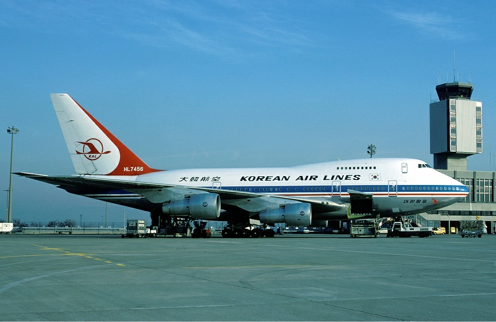 Korean Air Lines Boeing 747SP